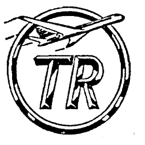 esitelogo